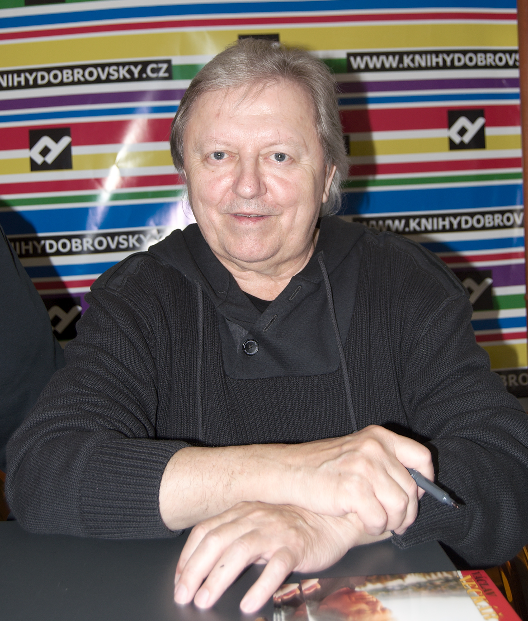 Václav Neckář na autogramiádě dne 18. listopadu 2010 v brněnském knihkupectví Knihy Dobrovský